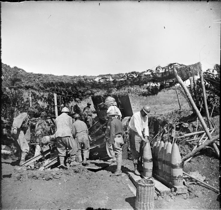 Mortier de 220 mm TR Schneider sur la côte du Talou (Vacherauville), près de Verdun.